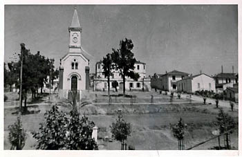 Ancien village de Gastu, actuelle commune de Bekkouche Lakhdar (Skikda, Algérie).